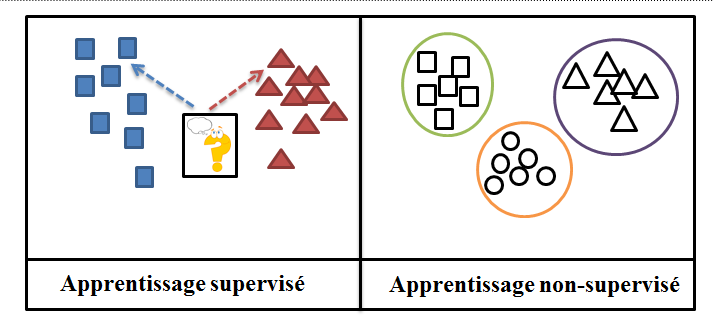 Différence entre les deux types d'apprentissage